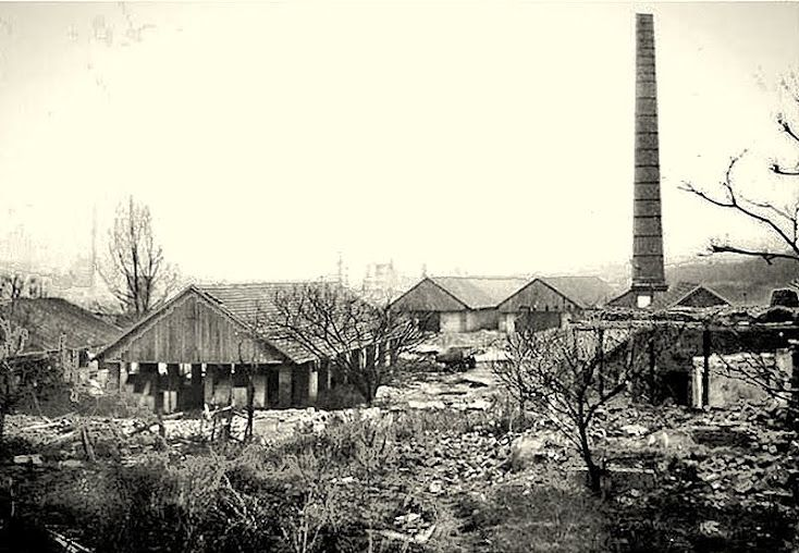 Demeterova tehelňa